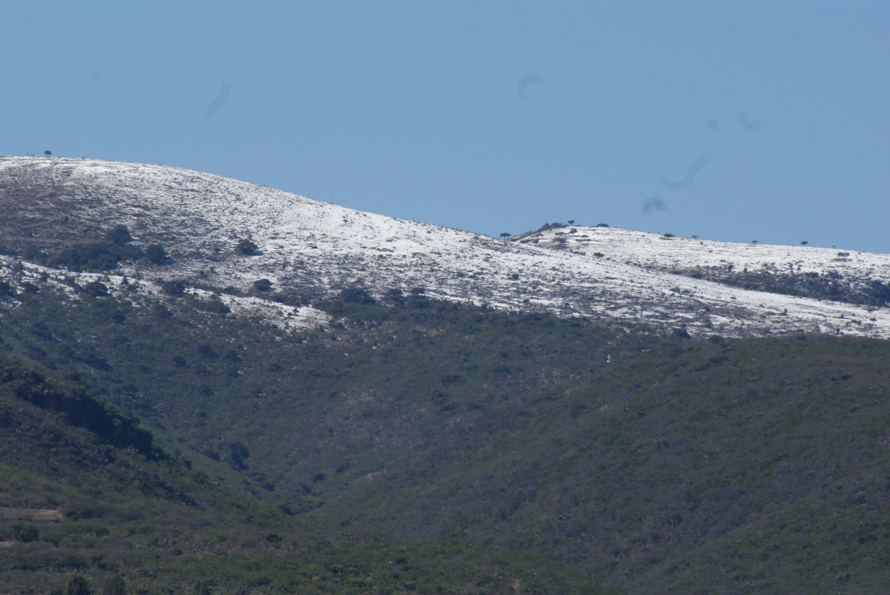 Nevada en el Parque Joya La Barreta